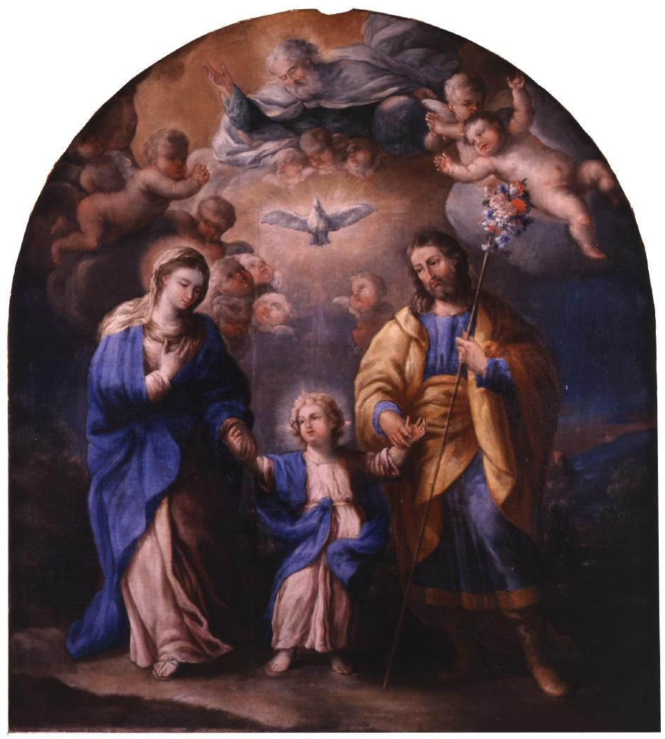 La obra representa a la Sagrada Familia cristiana y, en el plano superior, a la Santísima Trinidad.